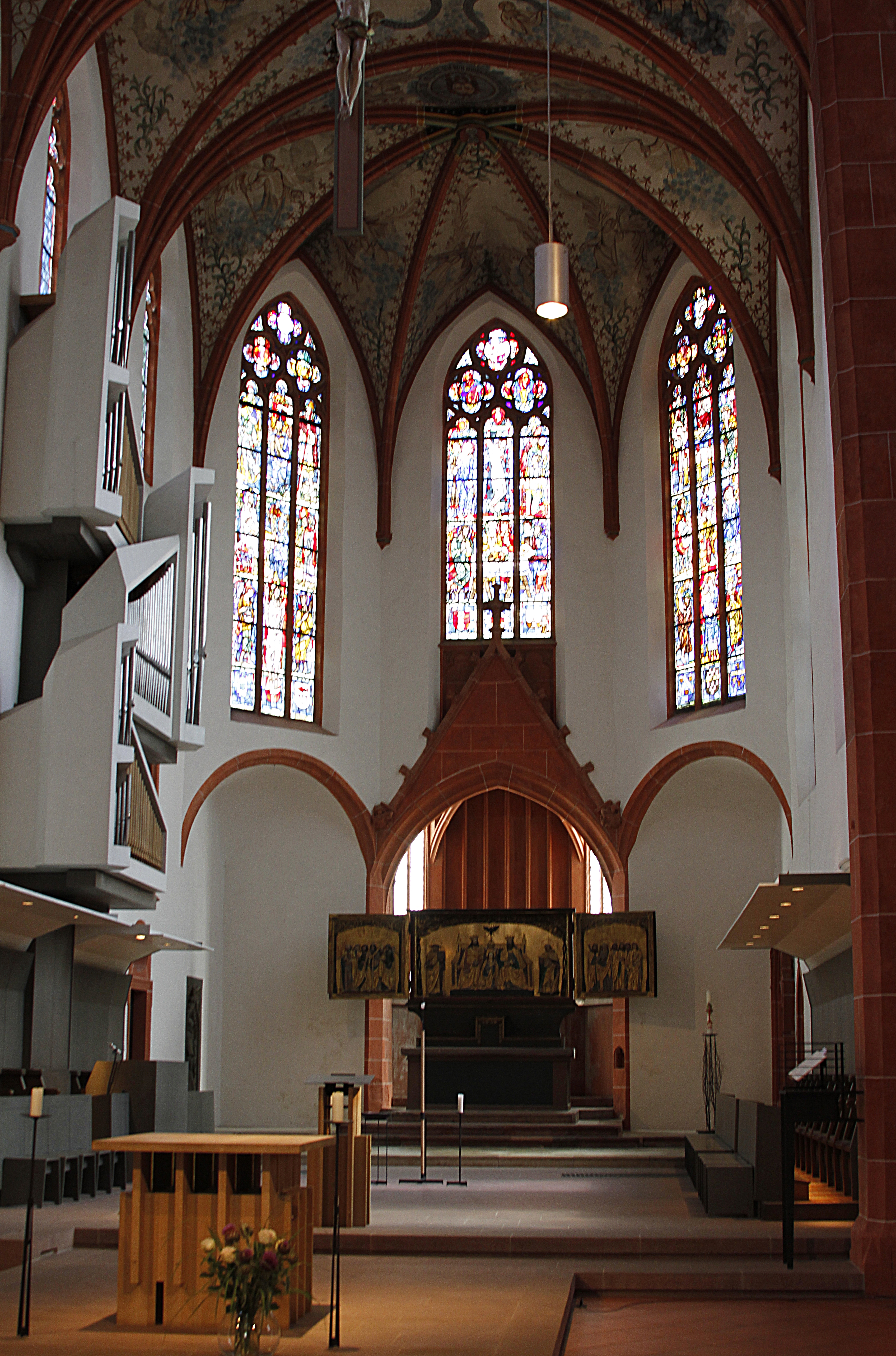 Karmeliterkirche - Mainz - Germany